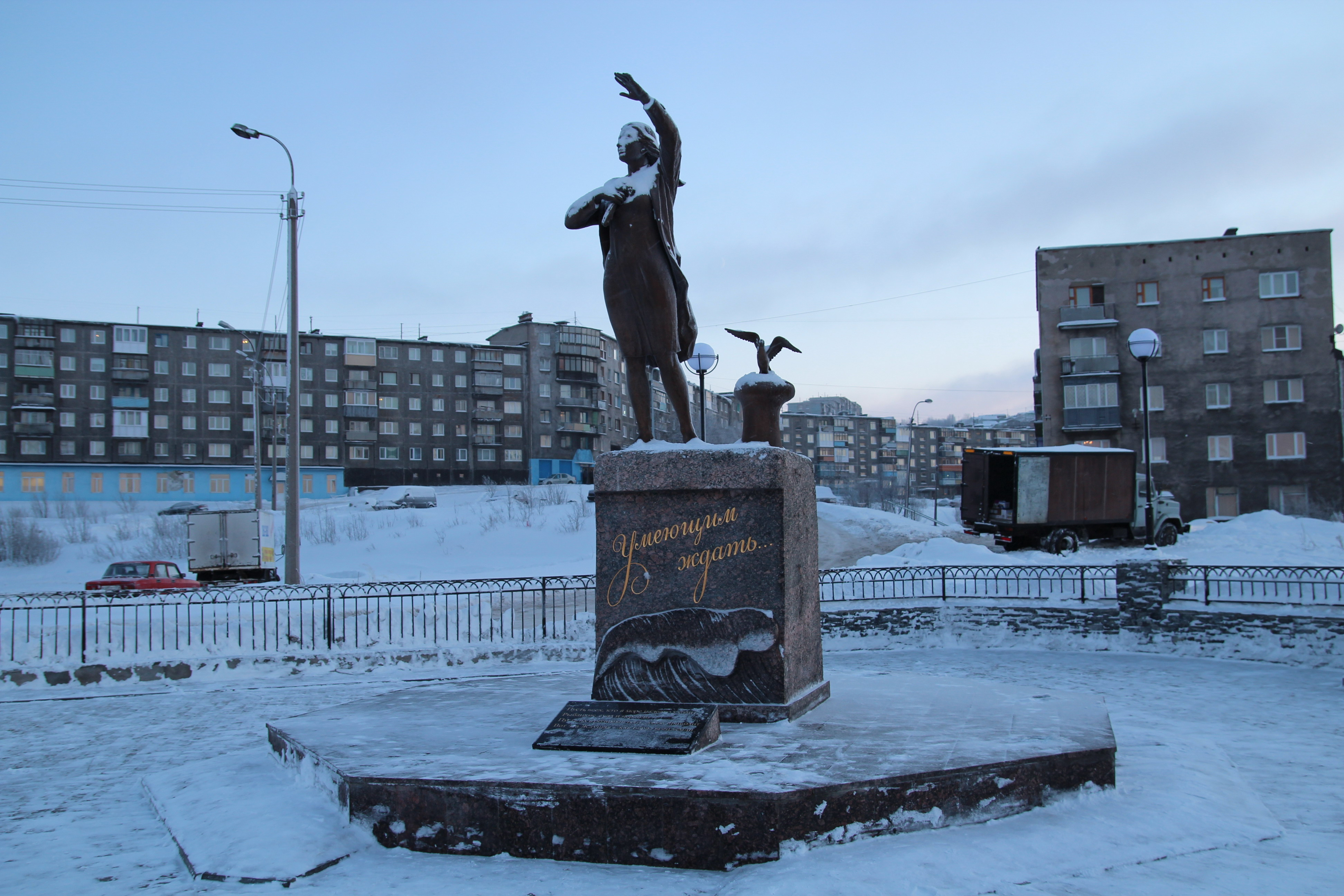 Памятник Ждущей